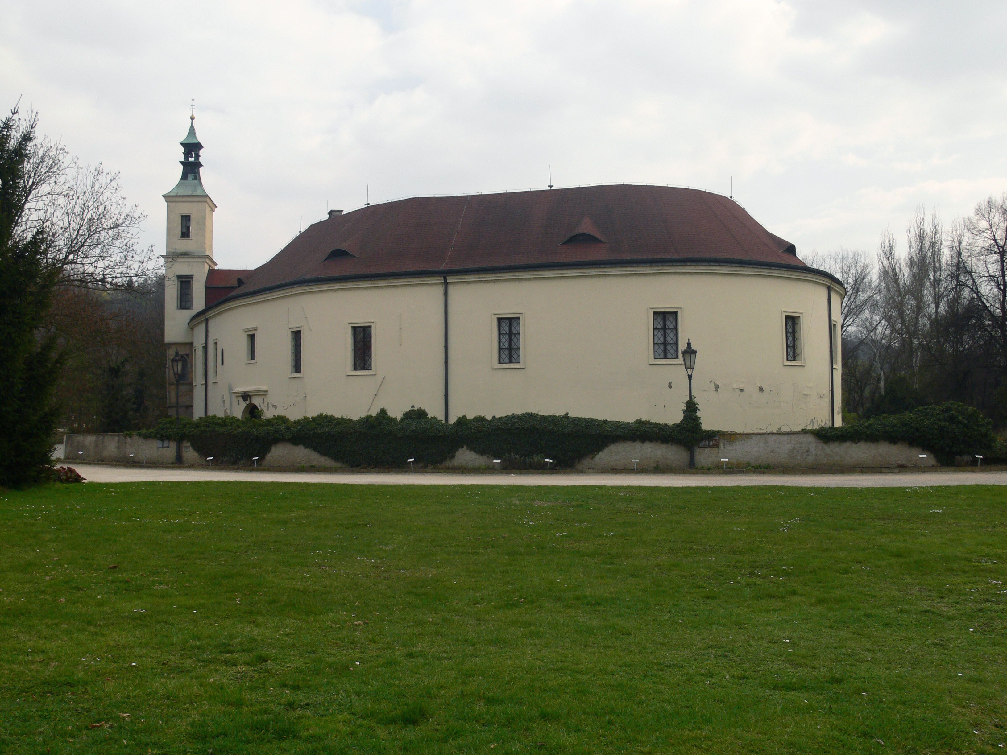 Pohled na budovu zámku od severu